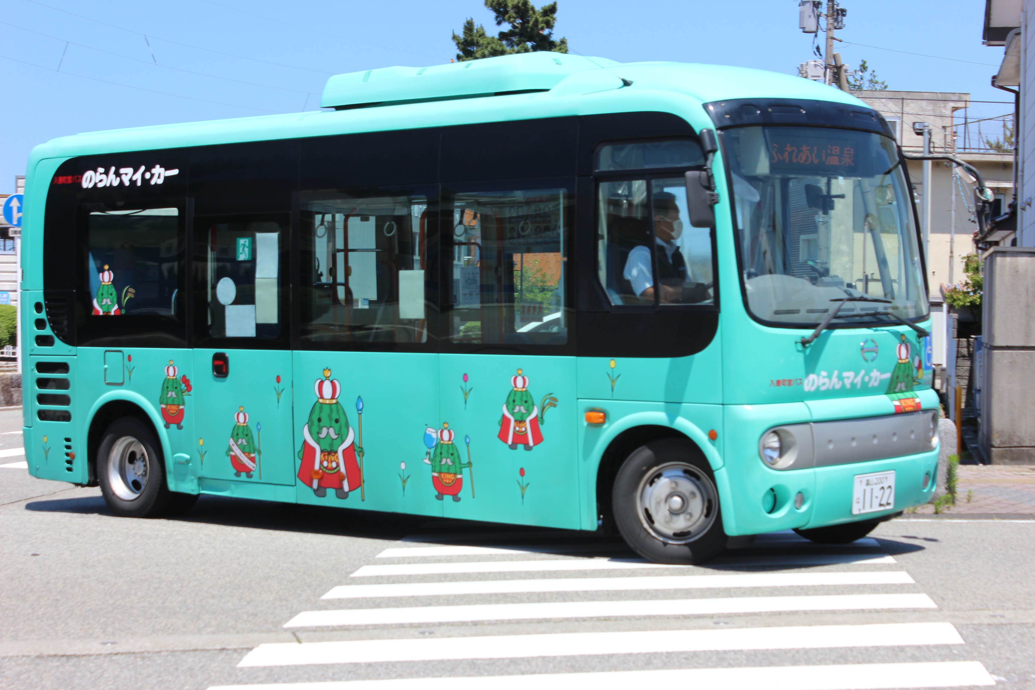 富山県下新川郡入善町のコミュニティバス「のらんマイ・カー」